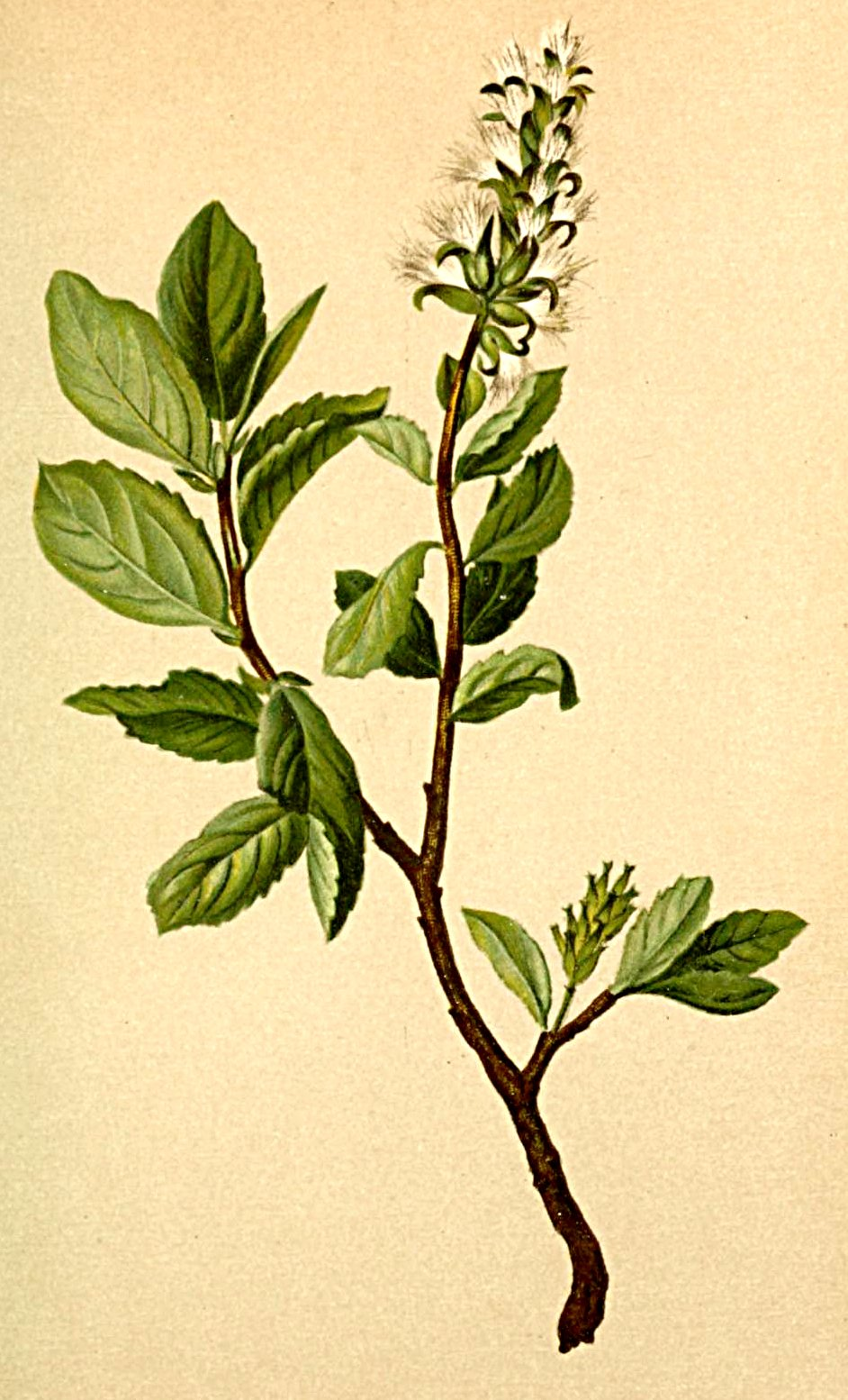 Salix myrsinites (Salix myrsinifolia)